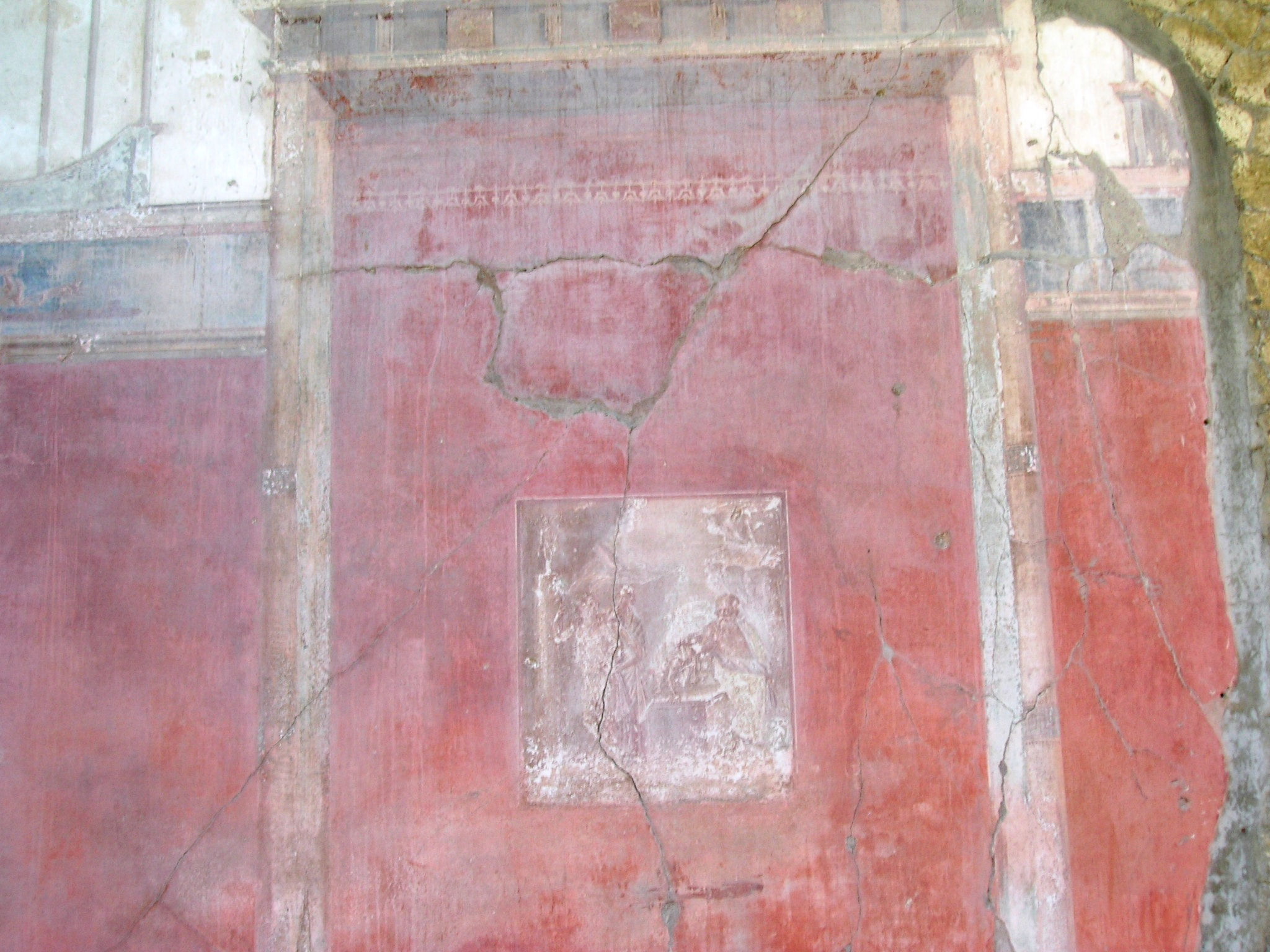 La Casa del Gran Portale ad Ercolano